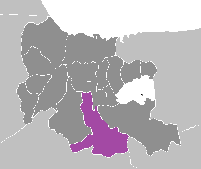 Municipio Miguel Peña, cuya creación fue prevista en el Artículo 9 de la Gaceta Oficial del Estado Carabobo Extraordinaria No. 1633 (Abril 2004).